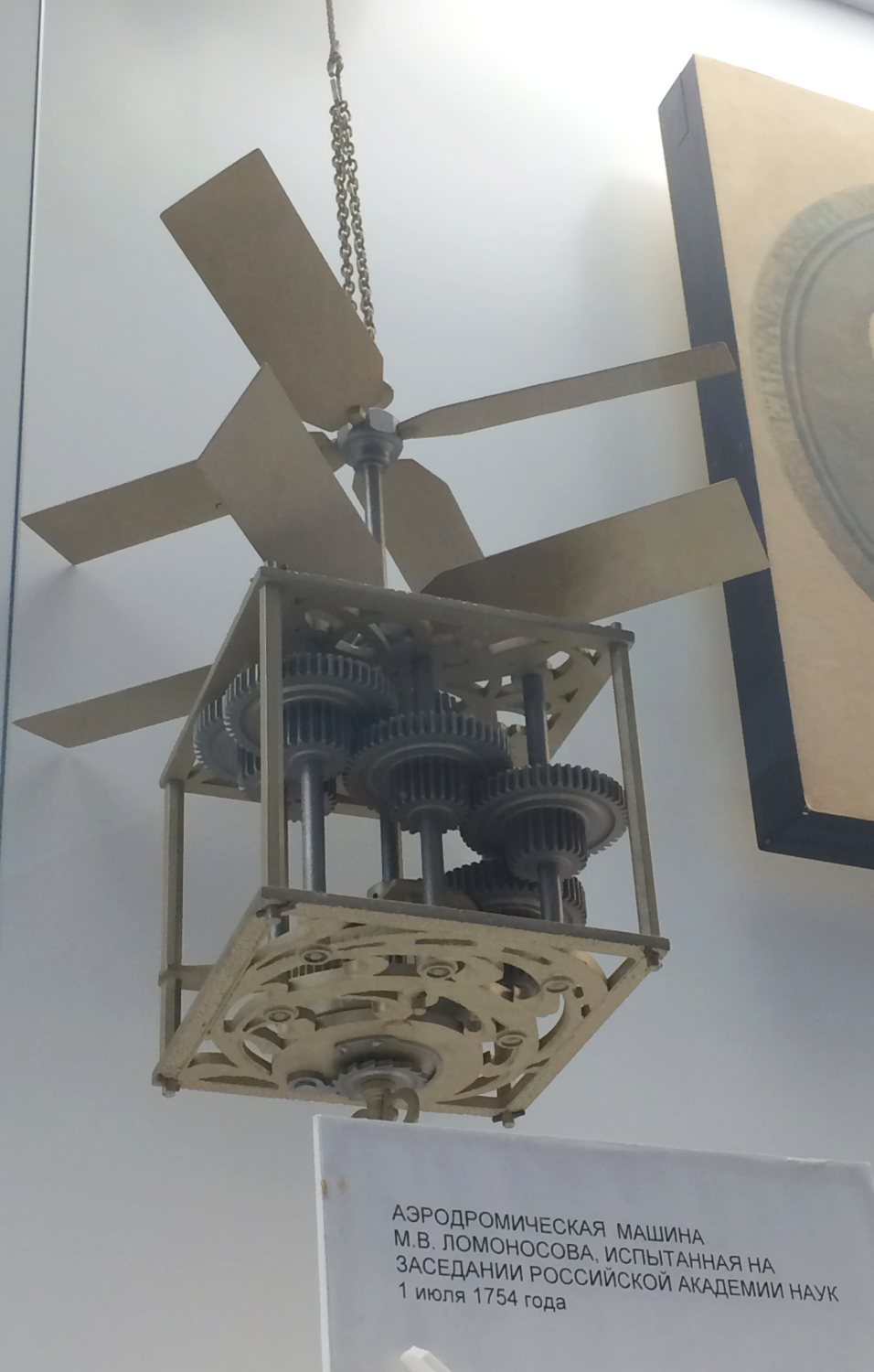 Реконструкция аэродромической машины М.В.Ломоносова (экспозиция ГМИК им. К.Э.Циолковского)